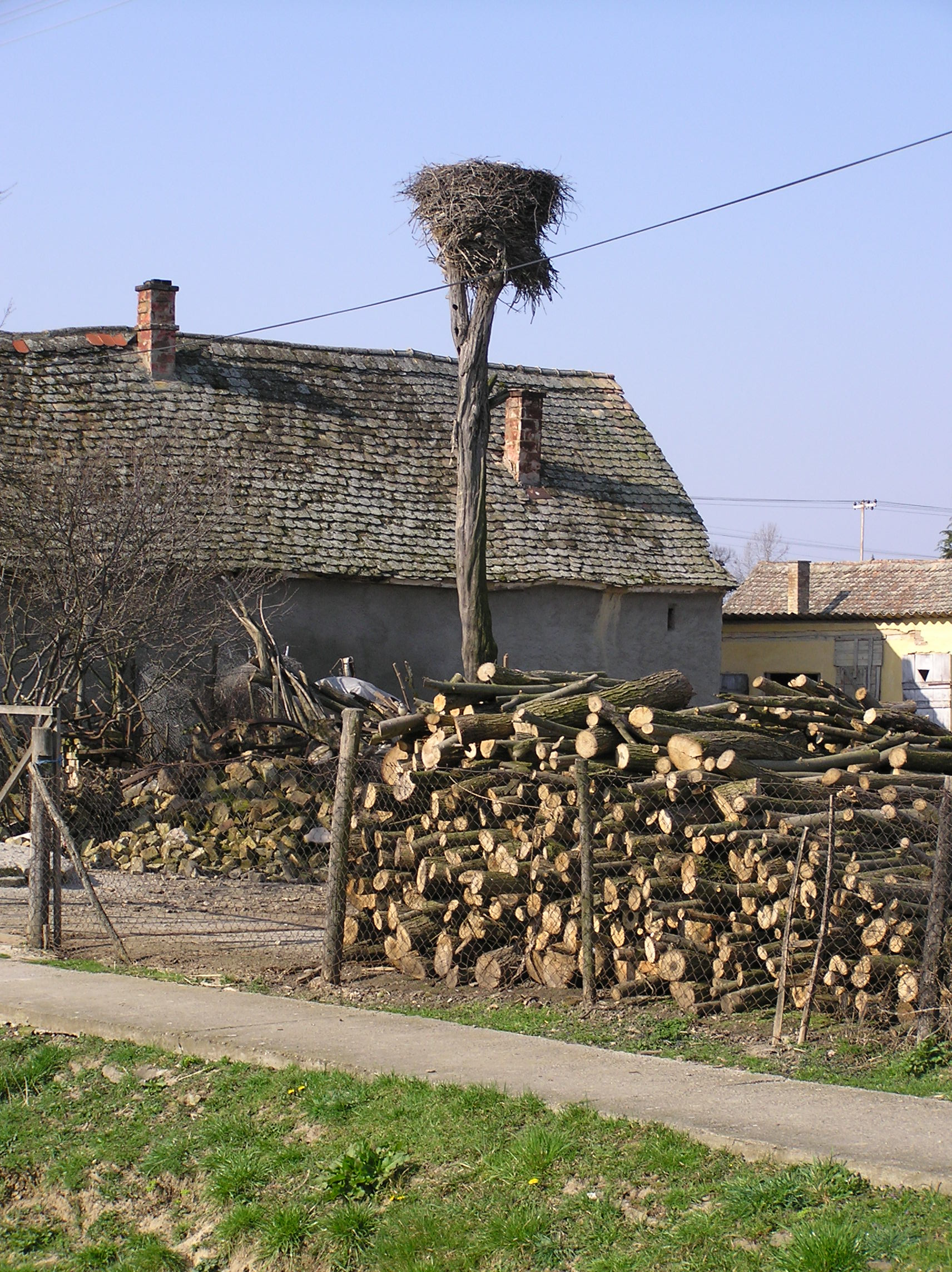 A kép Baranyabán egyetlen - ám annál régebbi - gólyafészkét ábrázolja